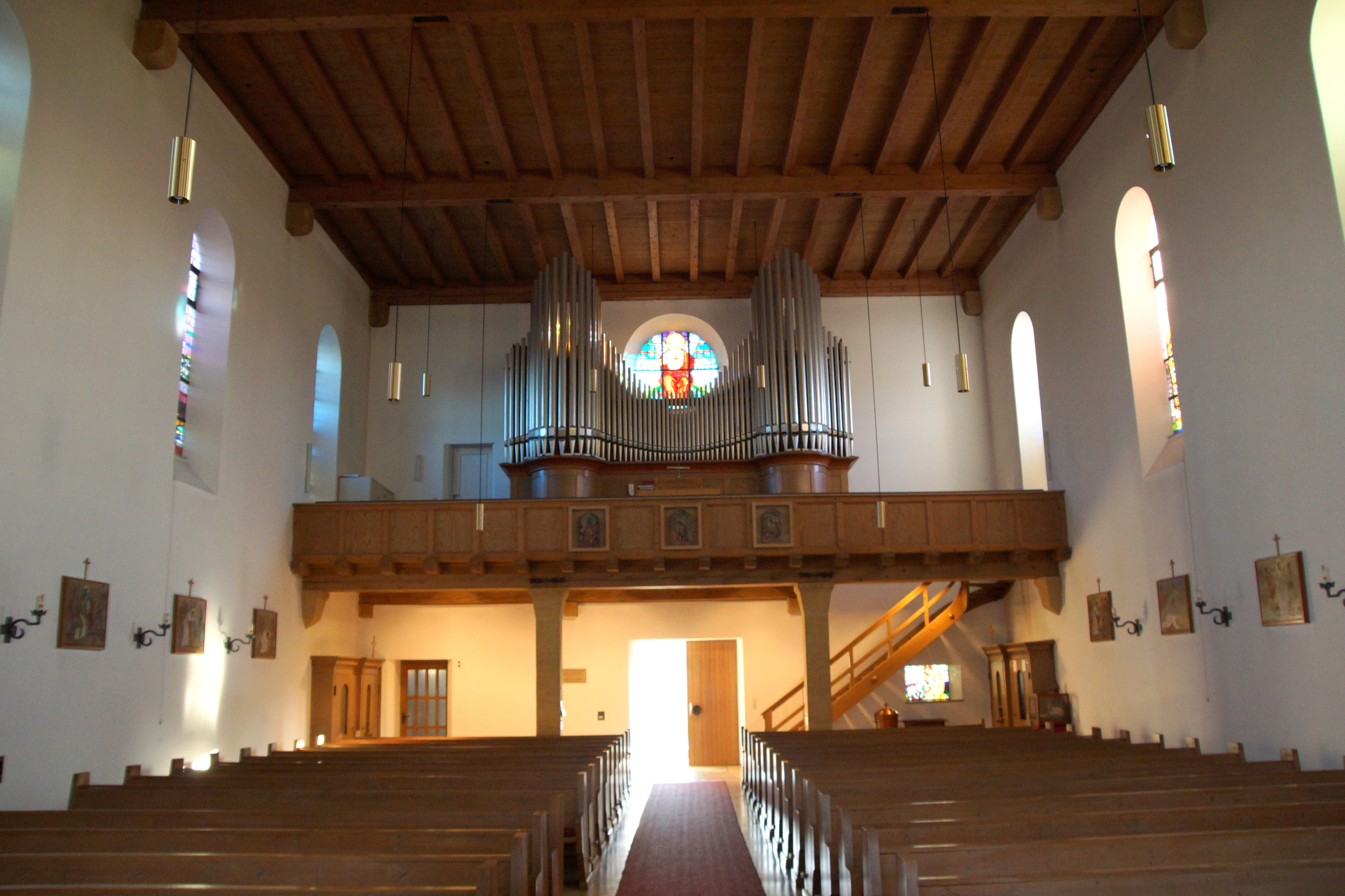 Die neue, 1932 errichtete, katholische Pfarrkirche St. Martin in Kaltenbrunn bei Weiherhammer.